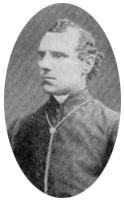 Cornelius Diependaal (1829-1893), altkatholischer Bischof von Deventer 1875-1893